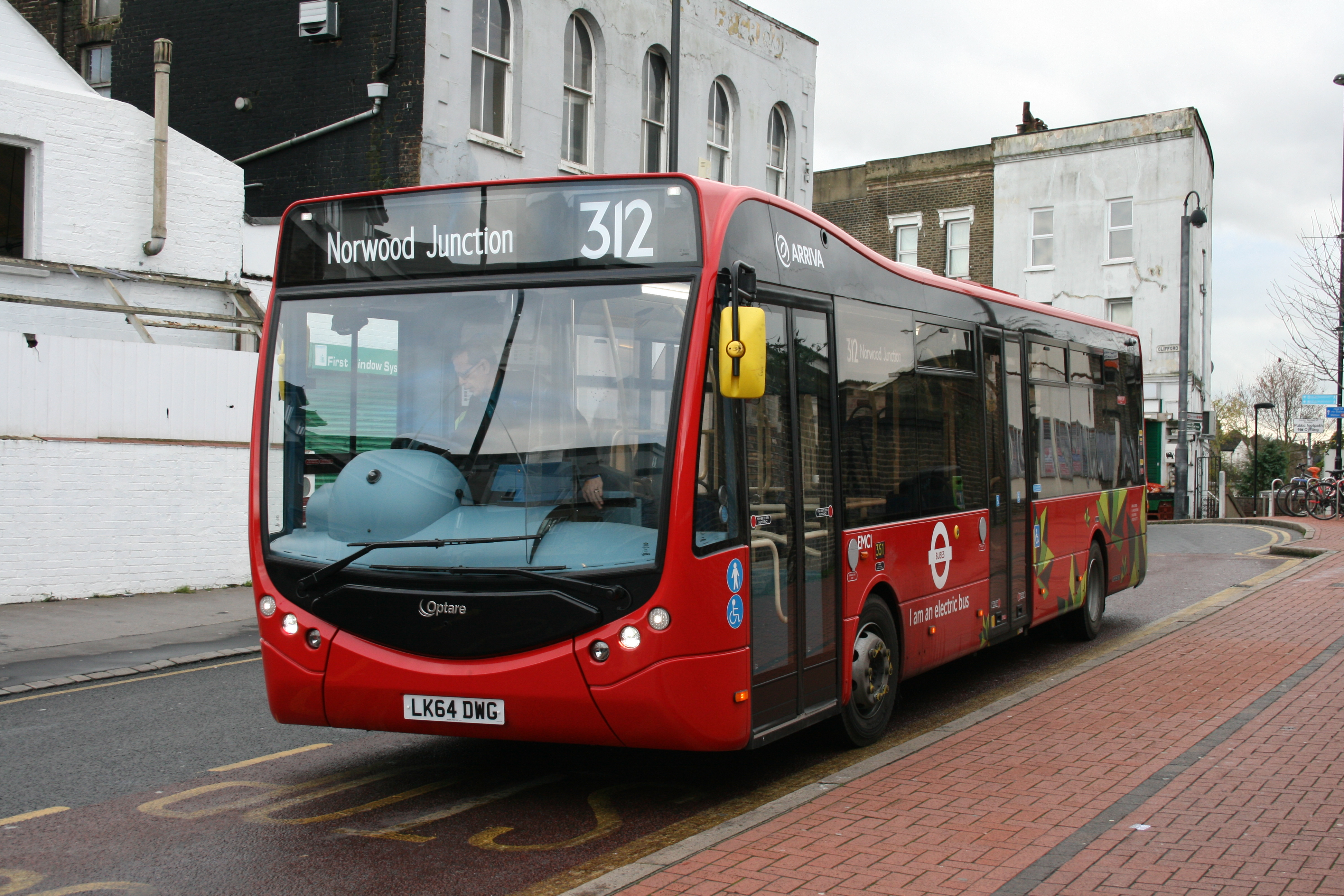 LK64 DWG